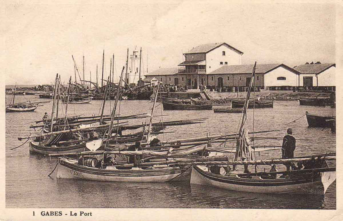 Port de Gabès à marée haute